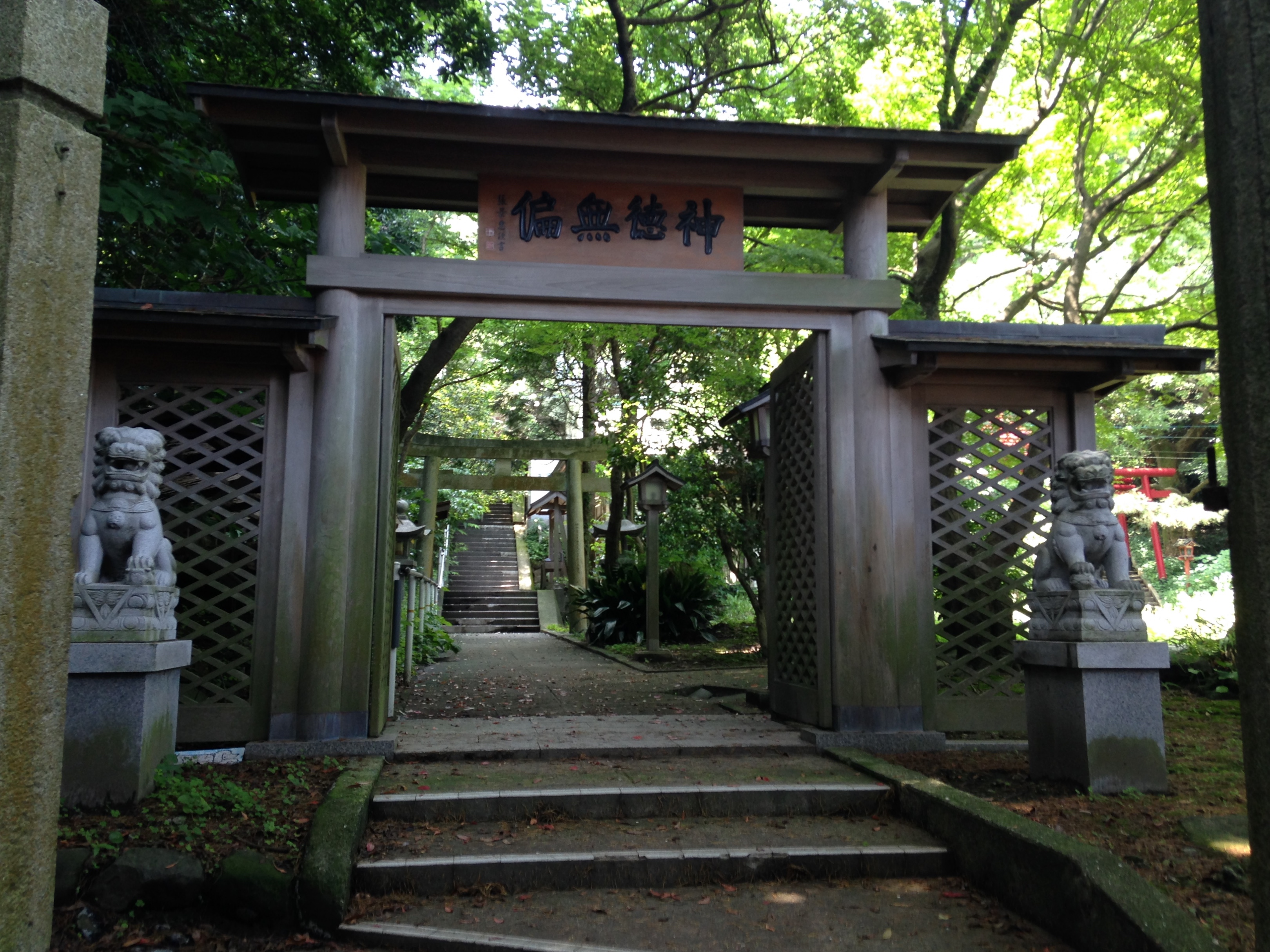 赤間神宮境内社・大連神社の神門